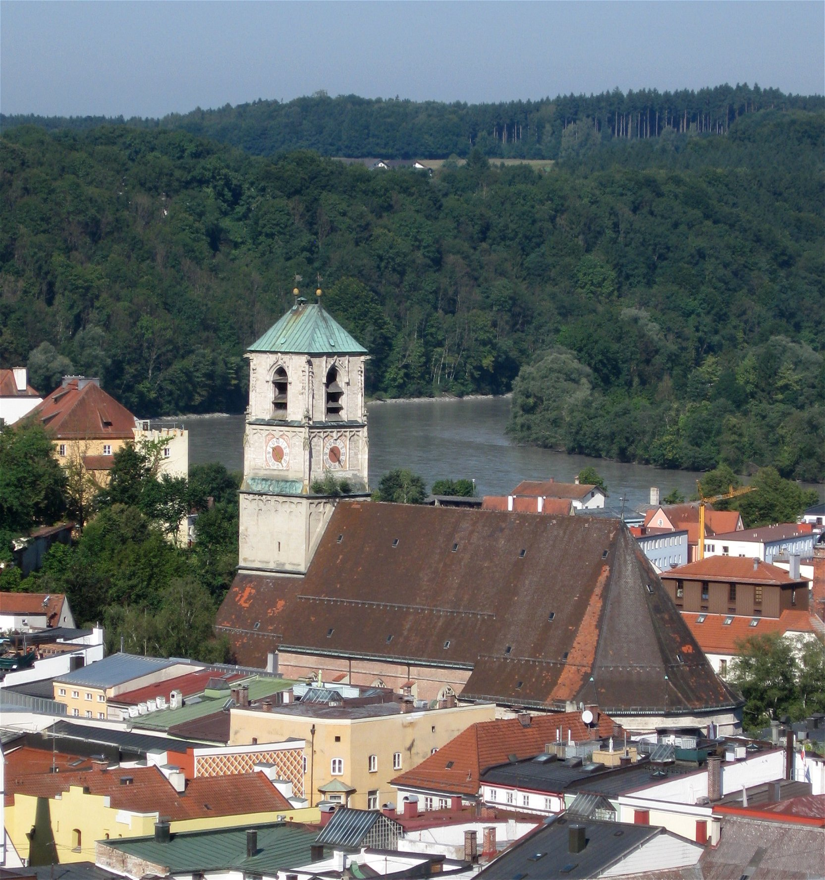 Kirchhofplatz 2; Nähe Kirchhofplatz. Kath. Stadtpfarrkirche St. Jakob, spätgotische Hallenkirche, unverputzter Ziegelbau, Chor, Sakristei und Westturm aus Tuffquadern, Baubeginn unter Hans von Burghausen 1410, 1432 Bauleitung durch Hans Stethaimer, 1445 Vollendung des Langhauses und Neubau des Chores durch Stephan Krumenauer, Turmbau ab 1458, seit 1461 Bauleitung durch Wolfgang Wiser, Abschluss 1478, Regotisierung nach Plänen von Michael Gaisberger 1879/80; mit Ausstattung; Hl. Sebastian, freistehende Steinskulptur aus Herrenchiemsee, 2. Hälfte 17. Jh.